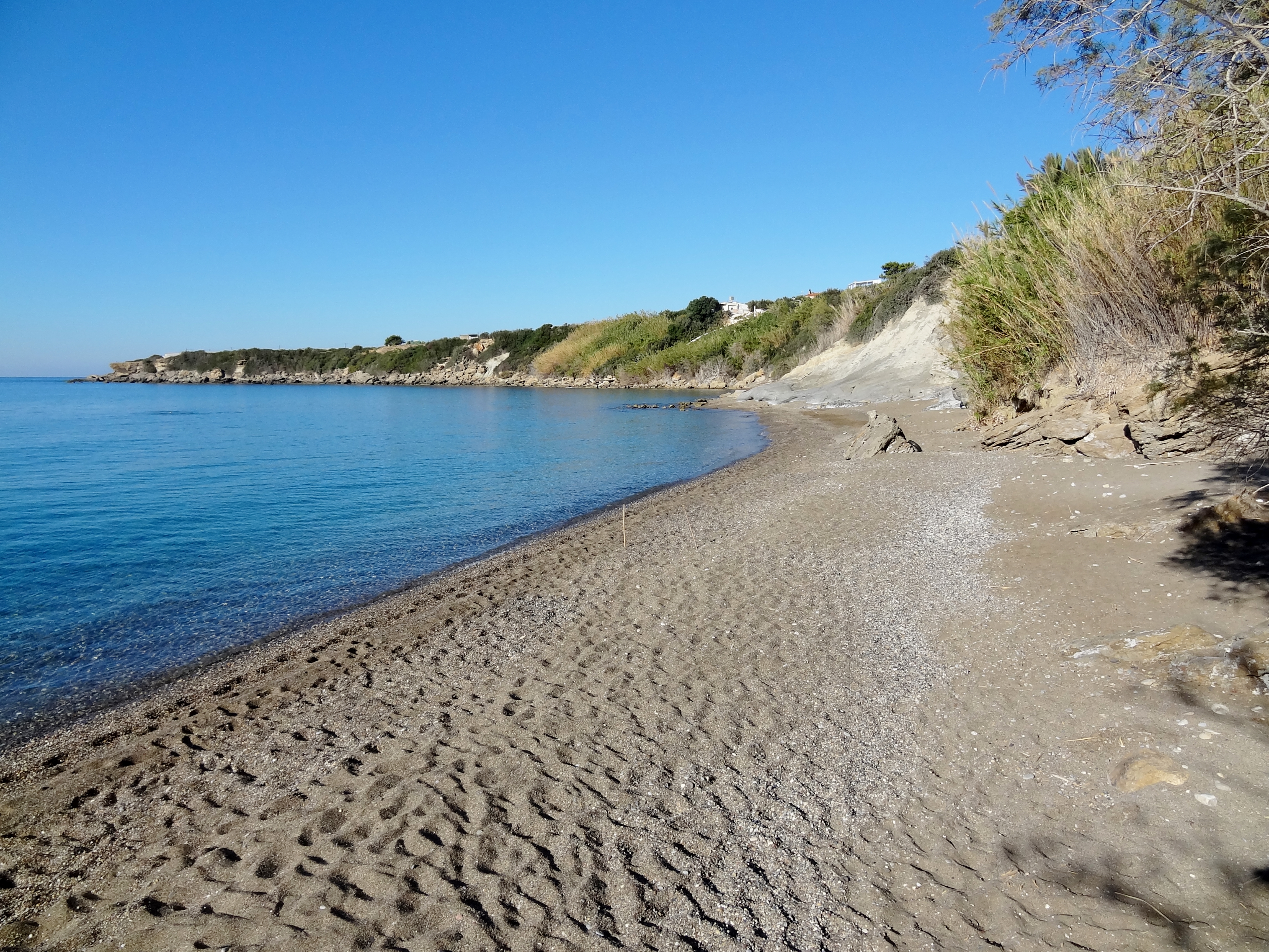 Strand von Livadi (Παραλία Λιβάδι ‚Wiesenstrand‘), auch Xerokamara (Ξεροκαμάρα ‚trockener Bogen‘), bei Ferma (Φέρμα), Gemeinde Ierapetra, Kreta, Griechenland